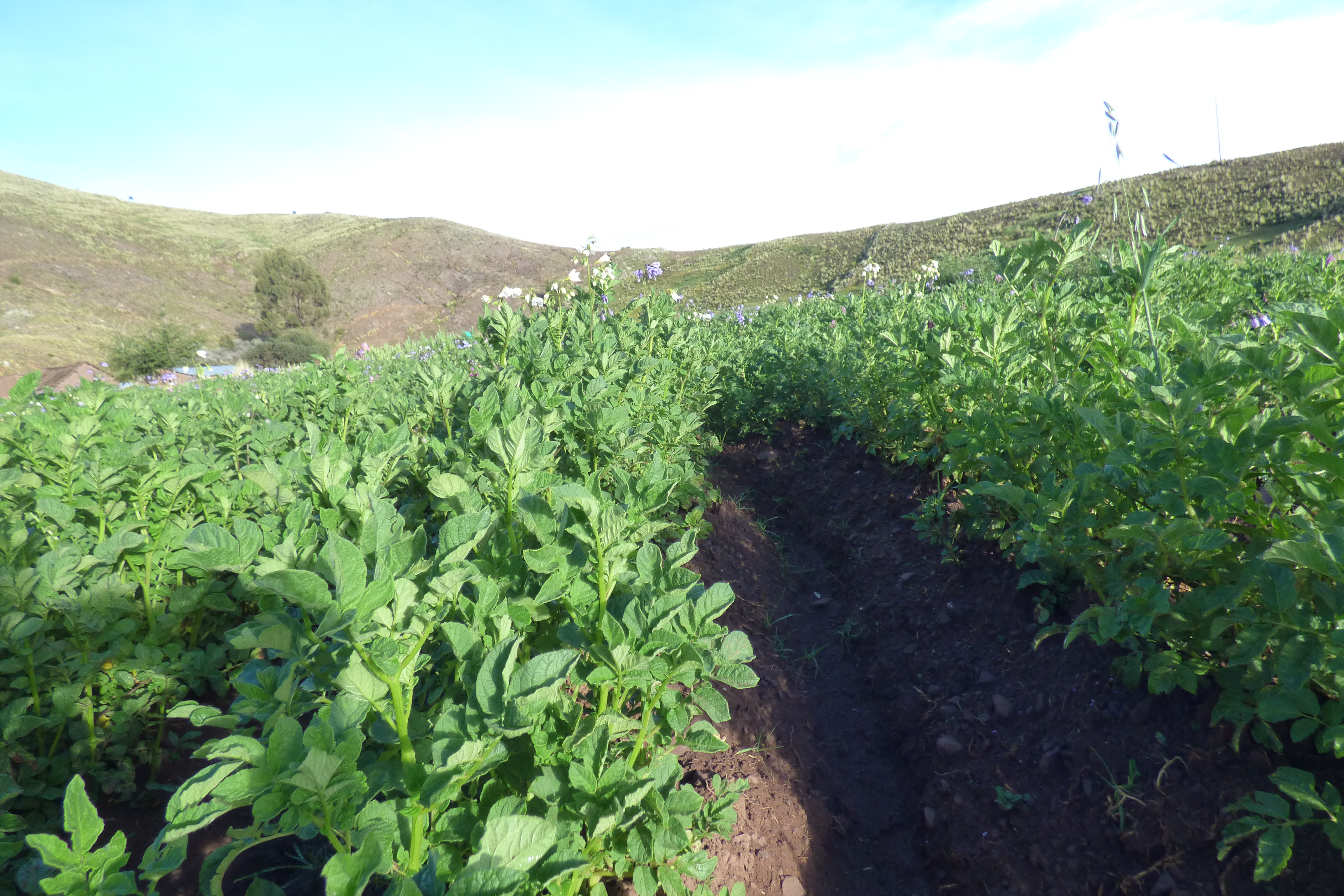 Cultivos de papa floreciendo en la Region Puno